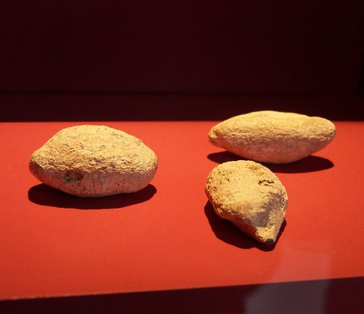 Schleuderbleie, eigenes Bild, GFDL